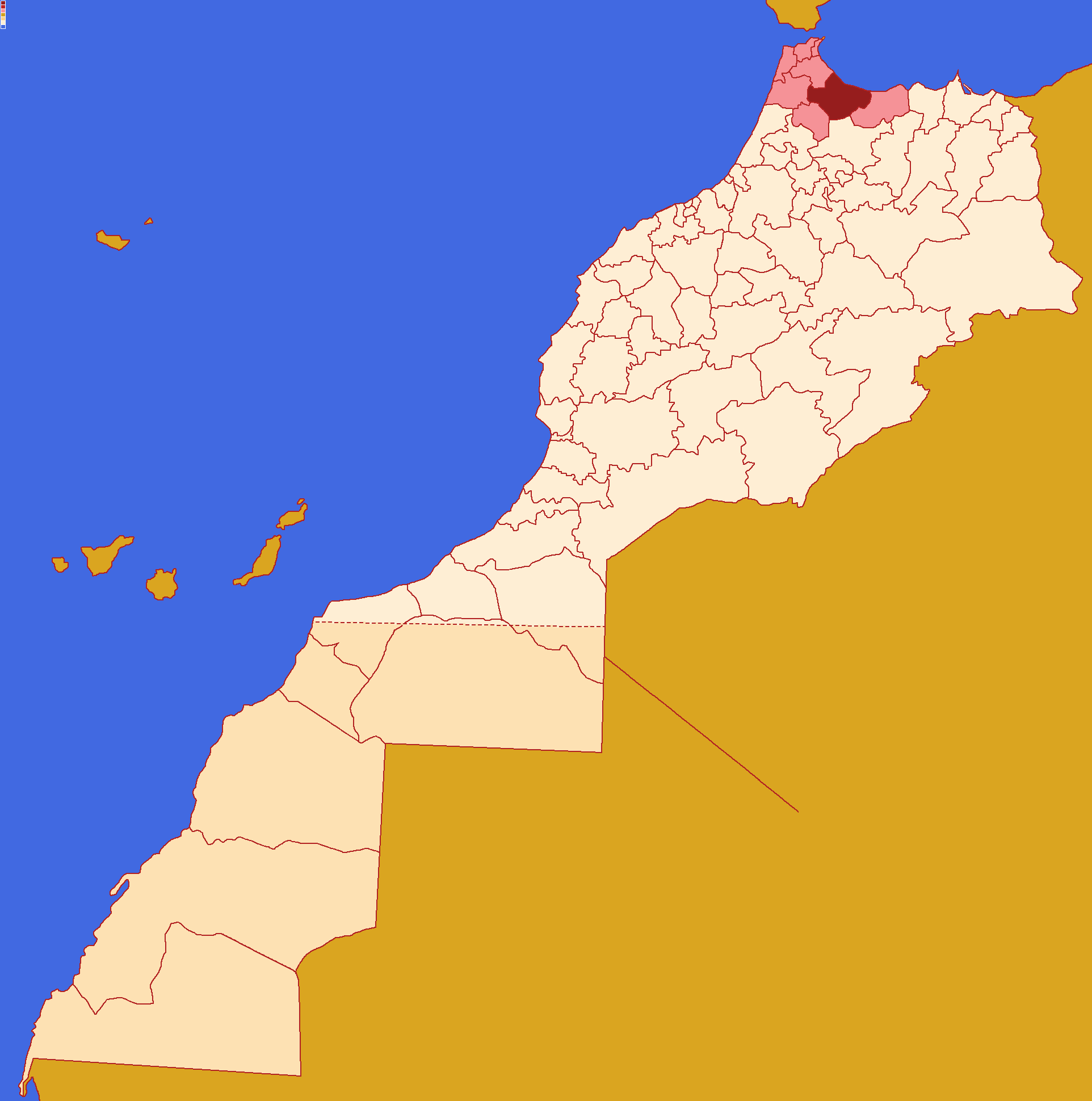 Localização da província de Xexuão dentro da região de Tânger-Tetuão-Al Hoceïma e dentro de Marrocos. Conforme a reforma administrativa de 2015.